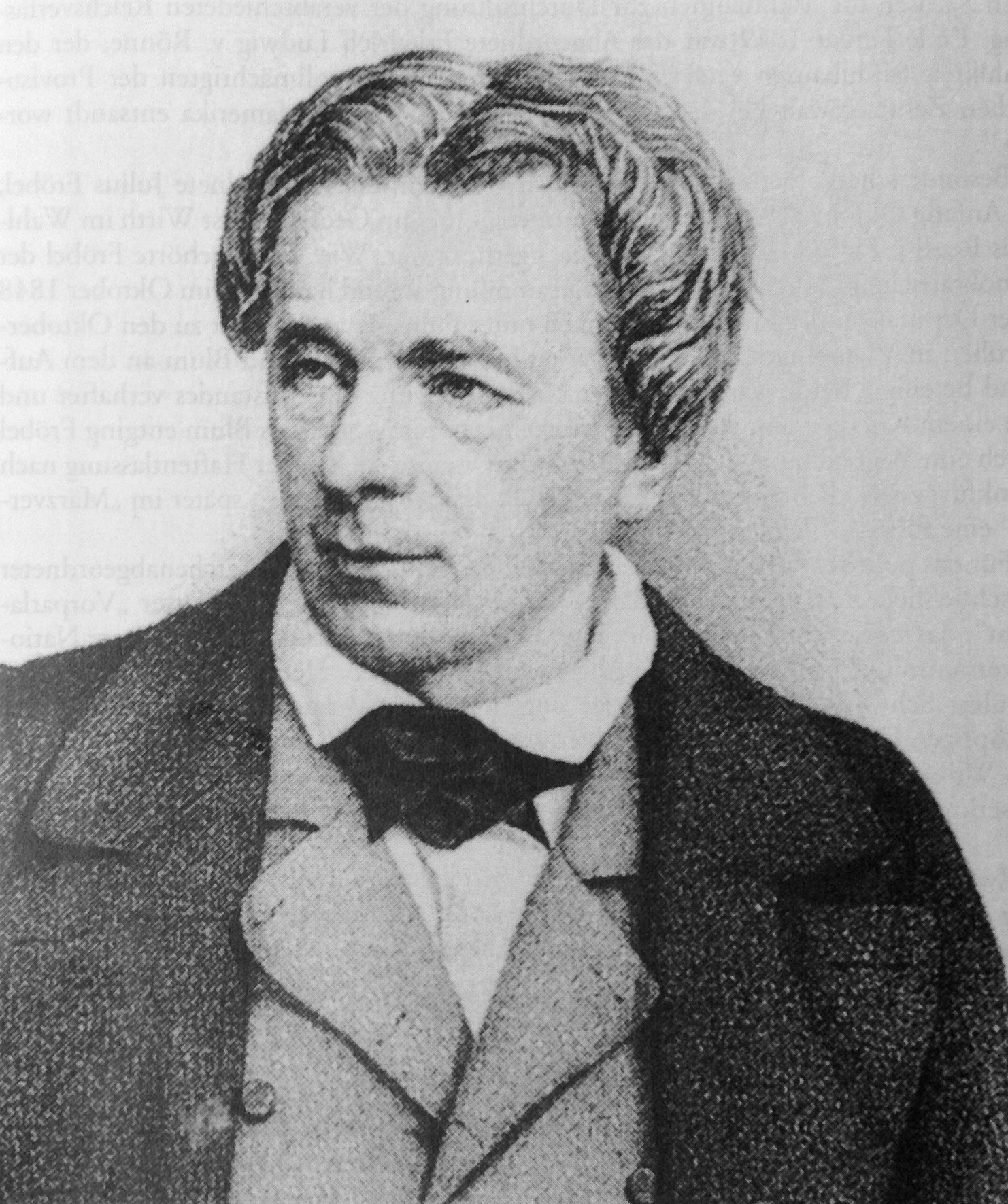 Friedrich Ludwig Ronne.